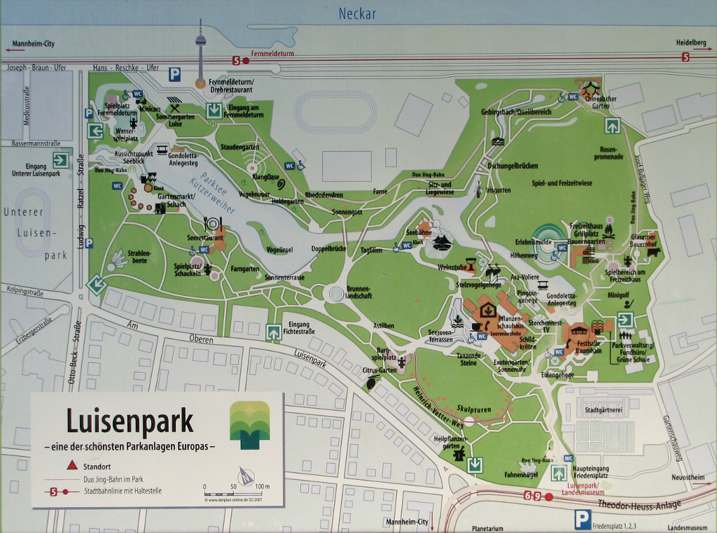 Plan des Luisenparks Mannheim (Dauerhaft installierte Tafel).